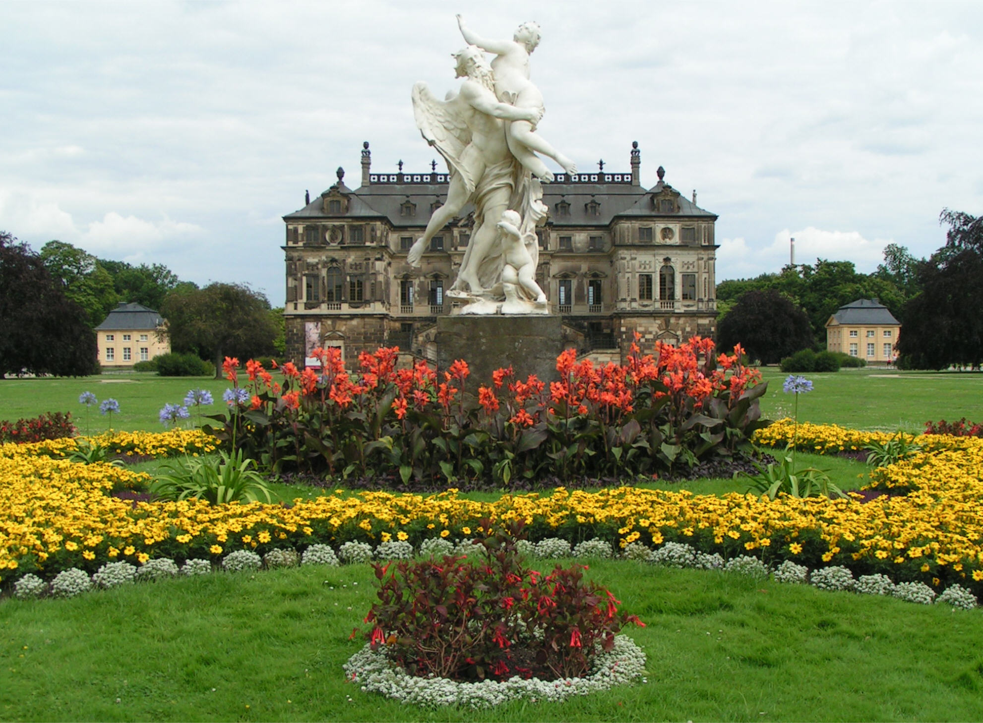 Großer Garten Dresden mit Palais und zwei Kavaliershäuschen